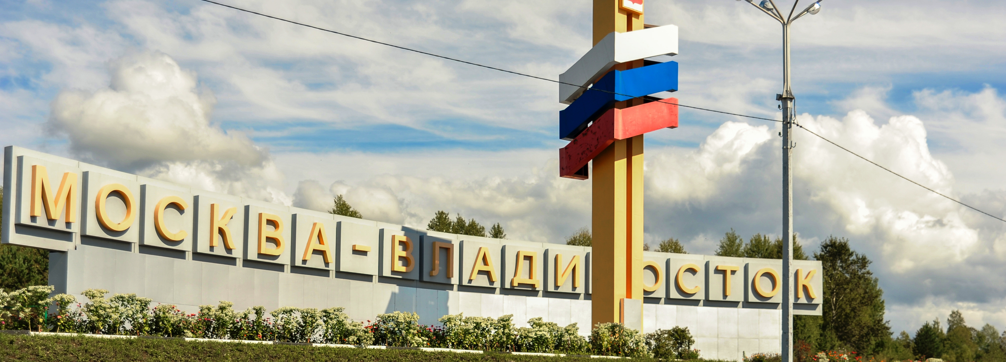 Трасса Амур Р297, памятный знак